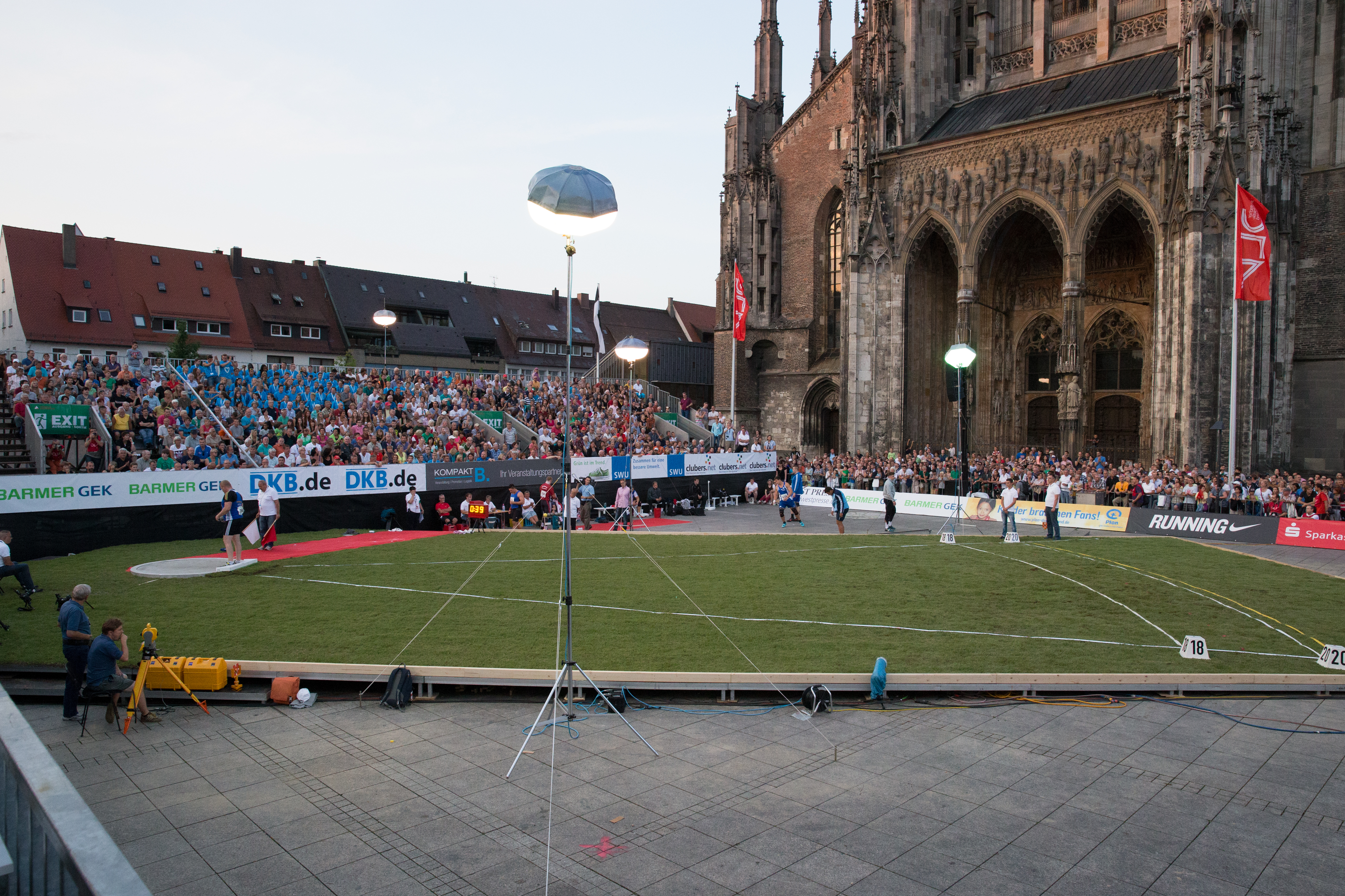 114. Deutsche Leichtatheltik Meisterschaften 2014 in Ulm